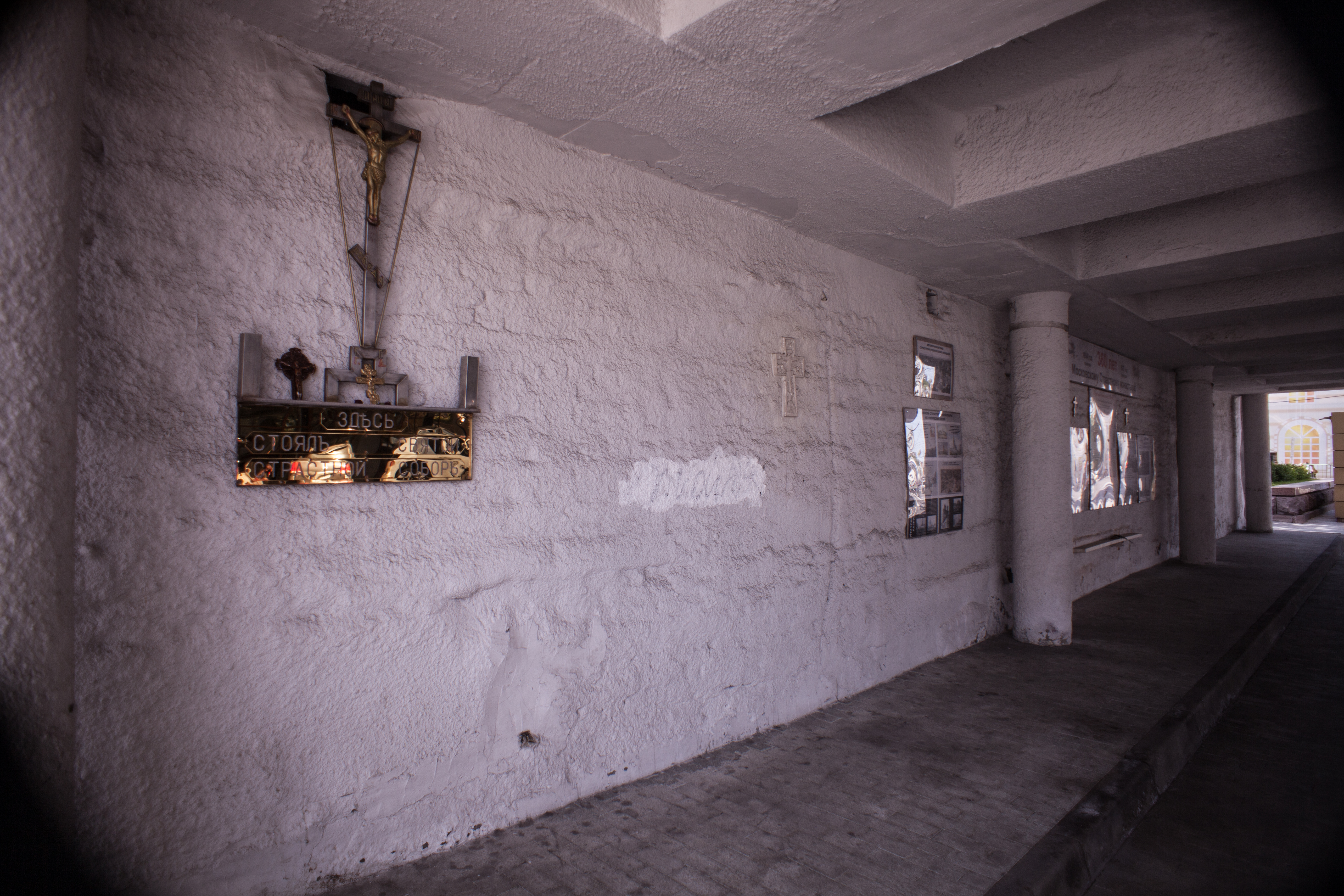 На этом месте стоял Страстной монастырь.